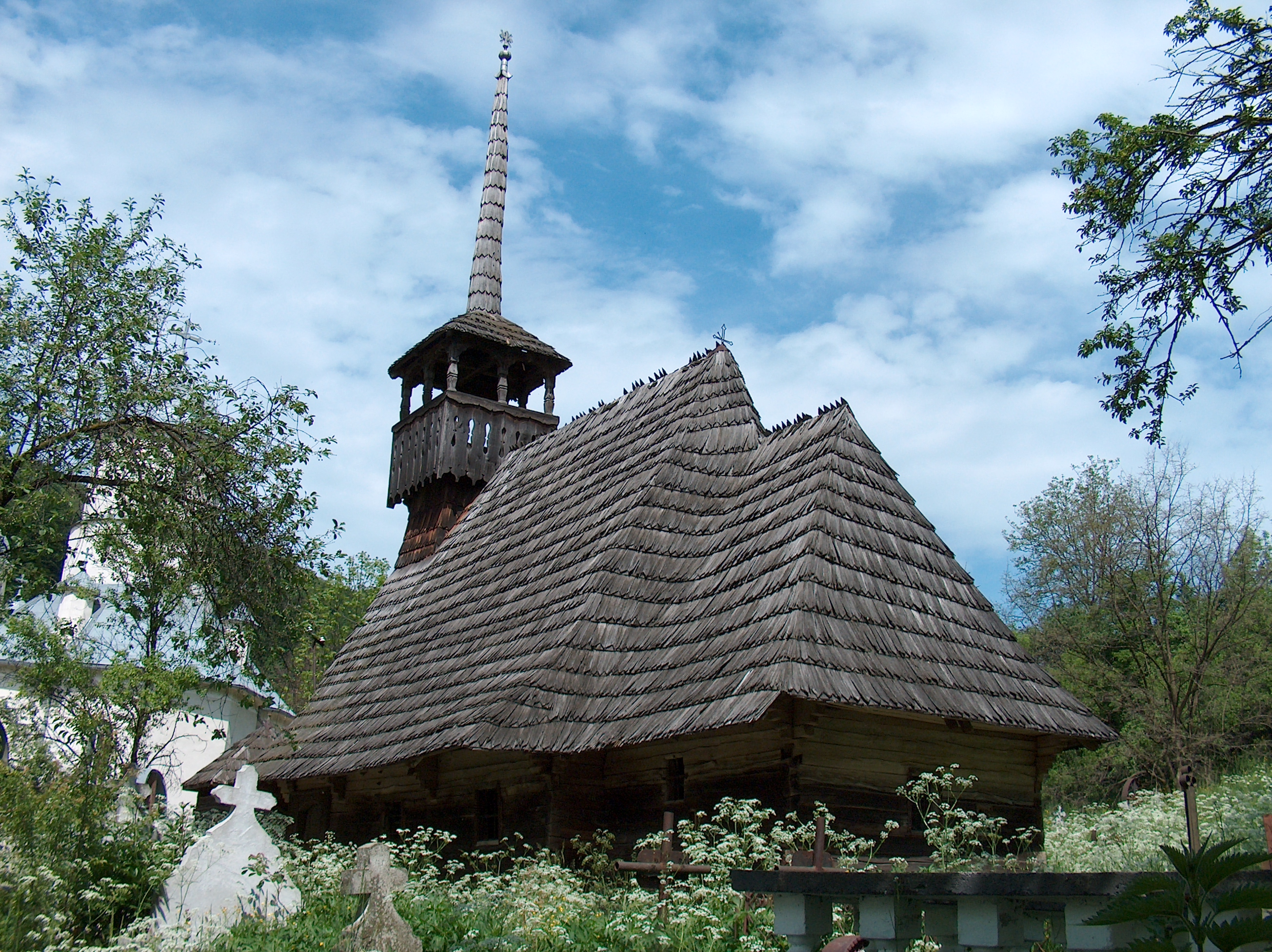 Biserica de lemn din Gersa, comuna Rebrişoara, judeţul Bistriţa Năsăud.